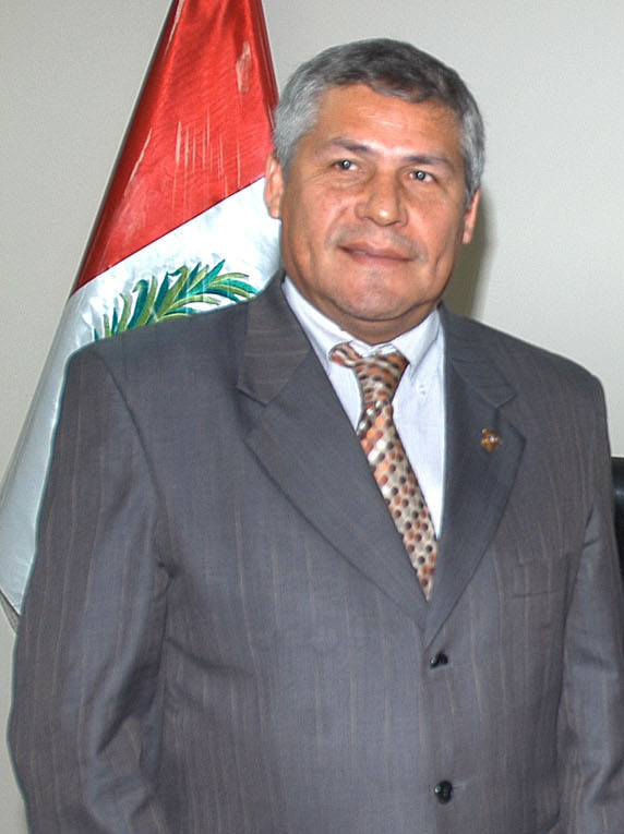 Los congresistas Olga Cribilleros y Juan Perry fueron designados presidenta y vicepresidente, respectivamente, de la Comisión de Vivienda y Construcción para el presente periodo legislativo. Acordaron invitar al ministro del sector para la próxima sesión.